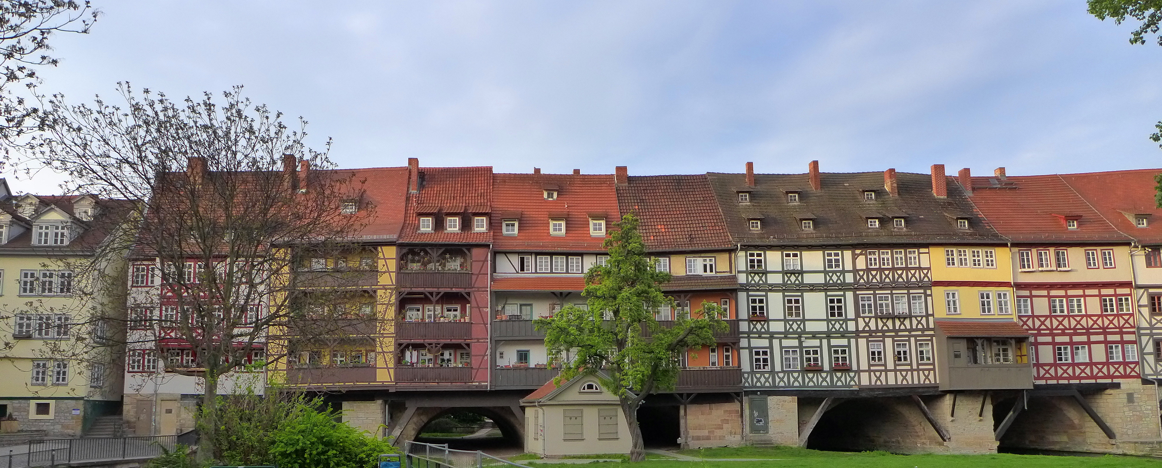 Kramerbrucke ,Erfurt.